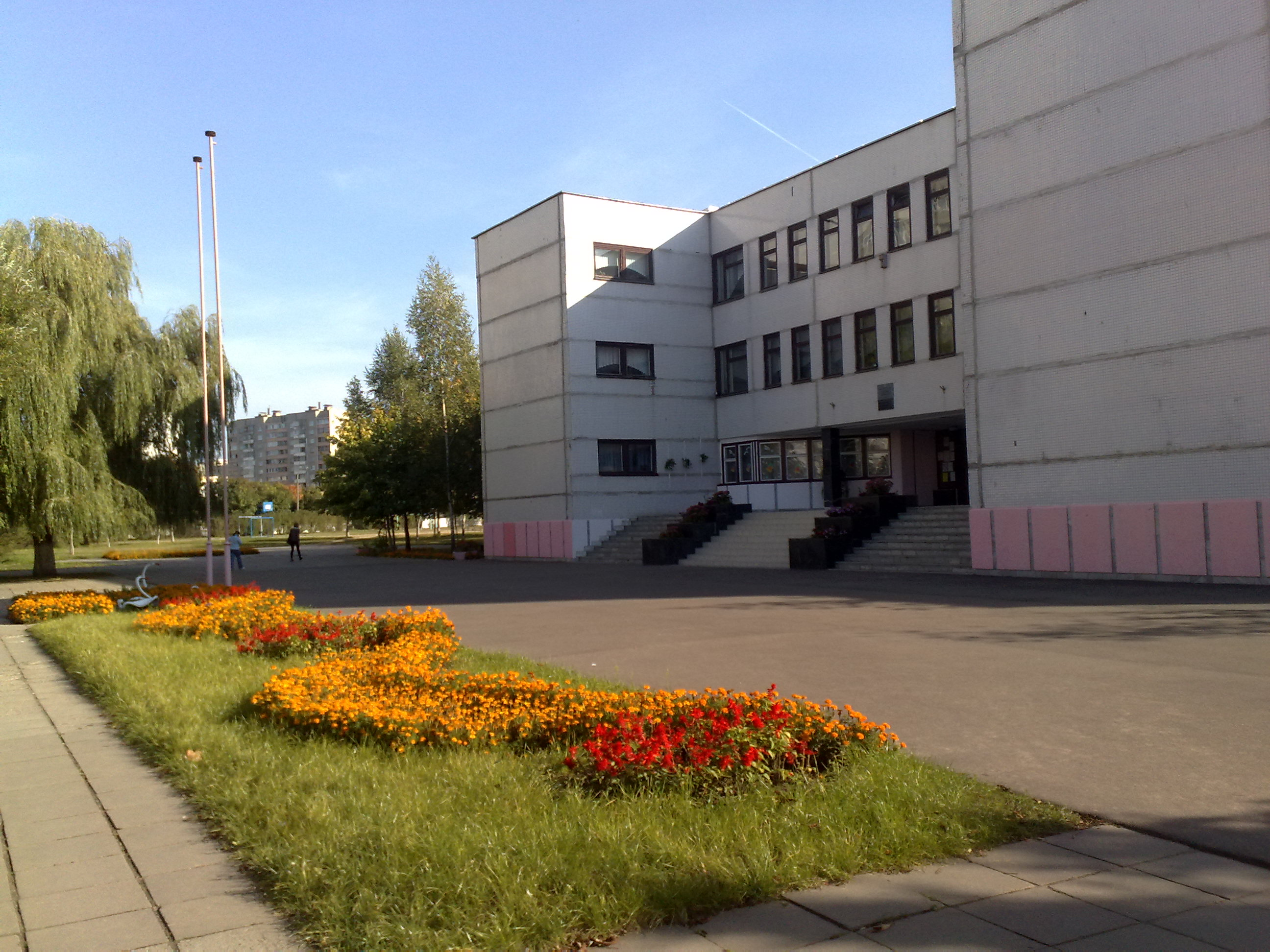 Школа №190 у Мінску